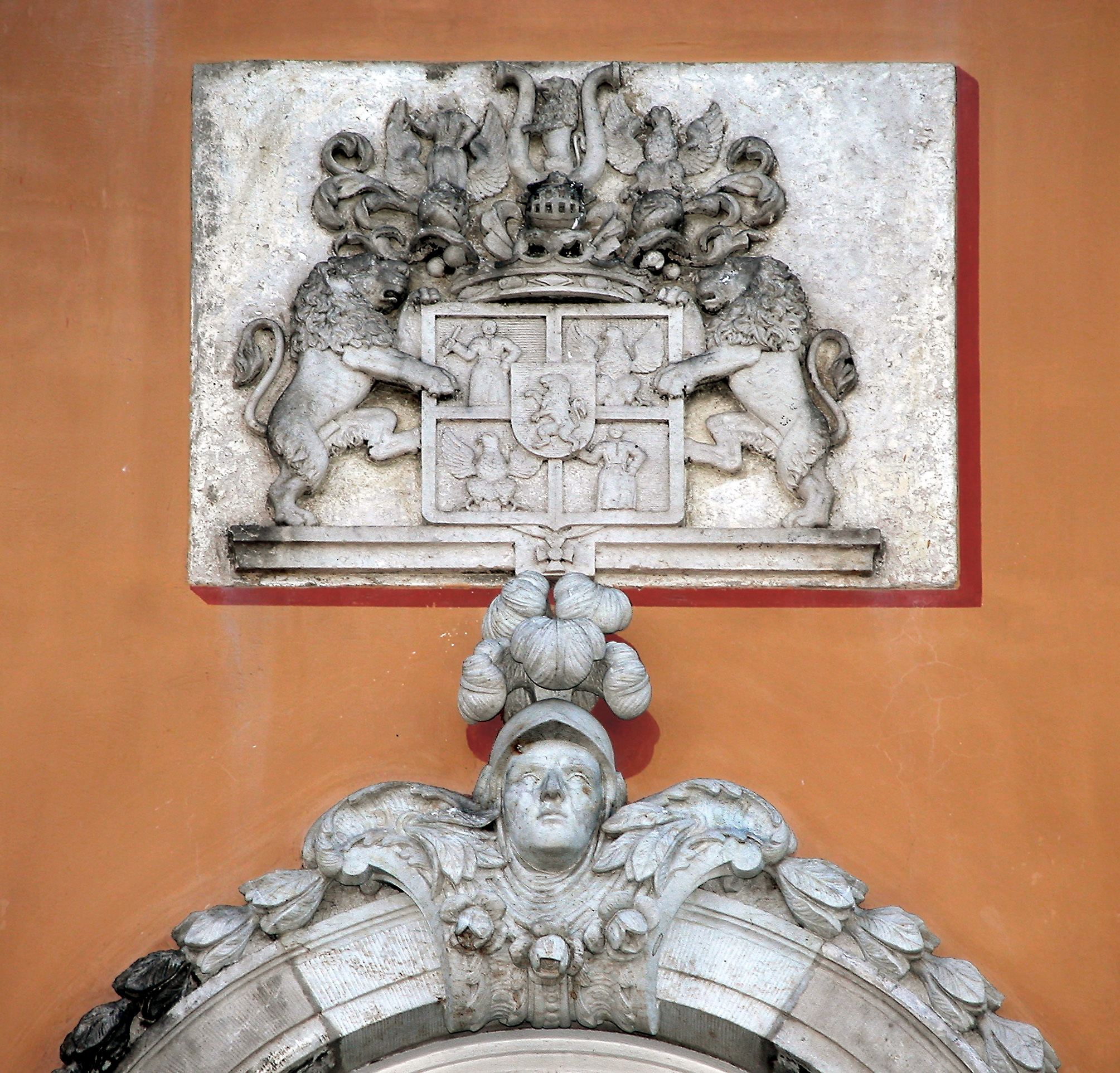 08.01.2005 01936 Königsbrück: Barockschloß (um 1700. In der DDR Krankenhaus. Wappen über dem Portal in der Nordfassade. [DSCN5722.TIF]20050108390DR.JPG(c)Blobelt